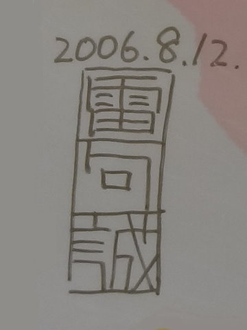 中文（台灣）: 2006年（第7屆）漫畫博覽會的雷句誠簽名。